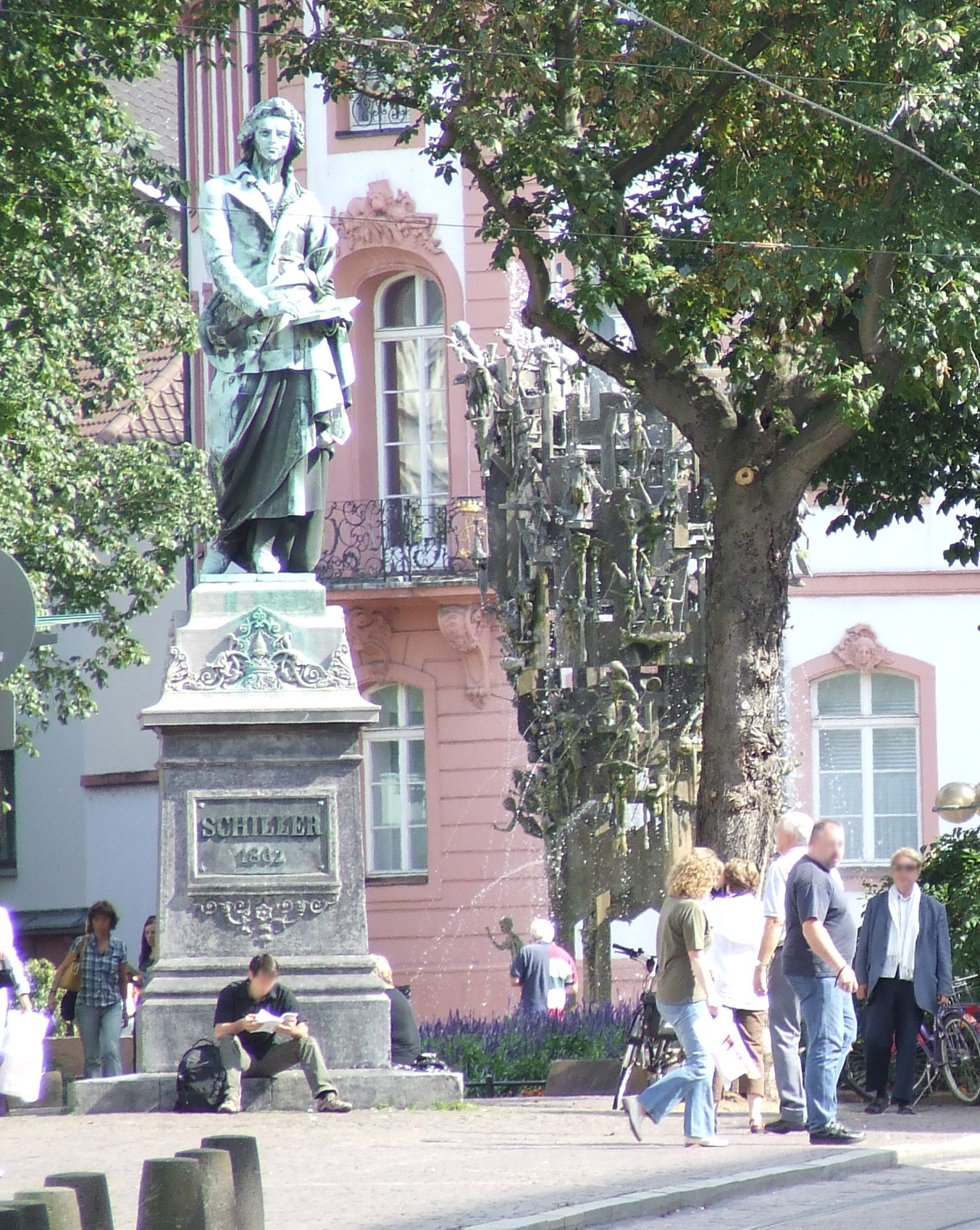 Schillerdenkmal (1862) auf dem Schillerplatz in Mainz